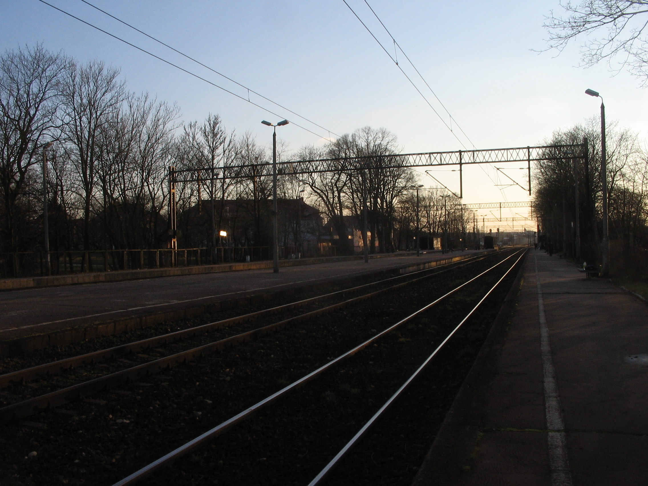 przystanek osobowy Olsztyn Zachodni - widok w stronę wyjazdu na Działdowo, Iławę, Elbląg